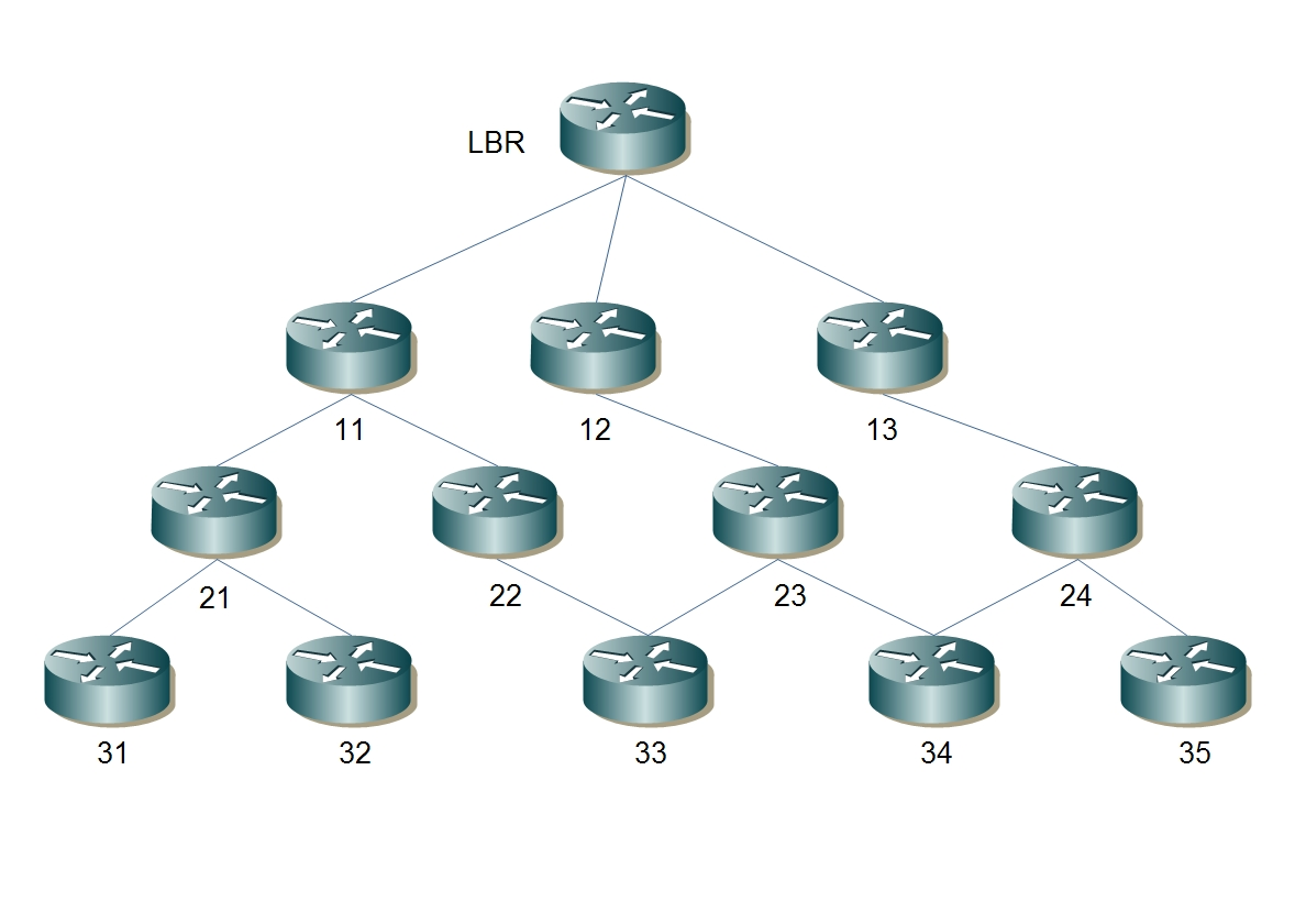 schéma DAG pour 6LowPAN